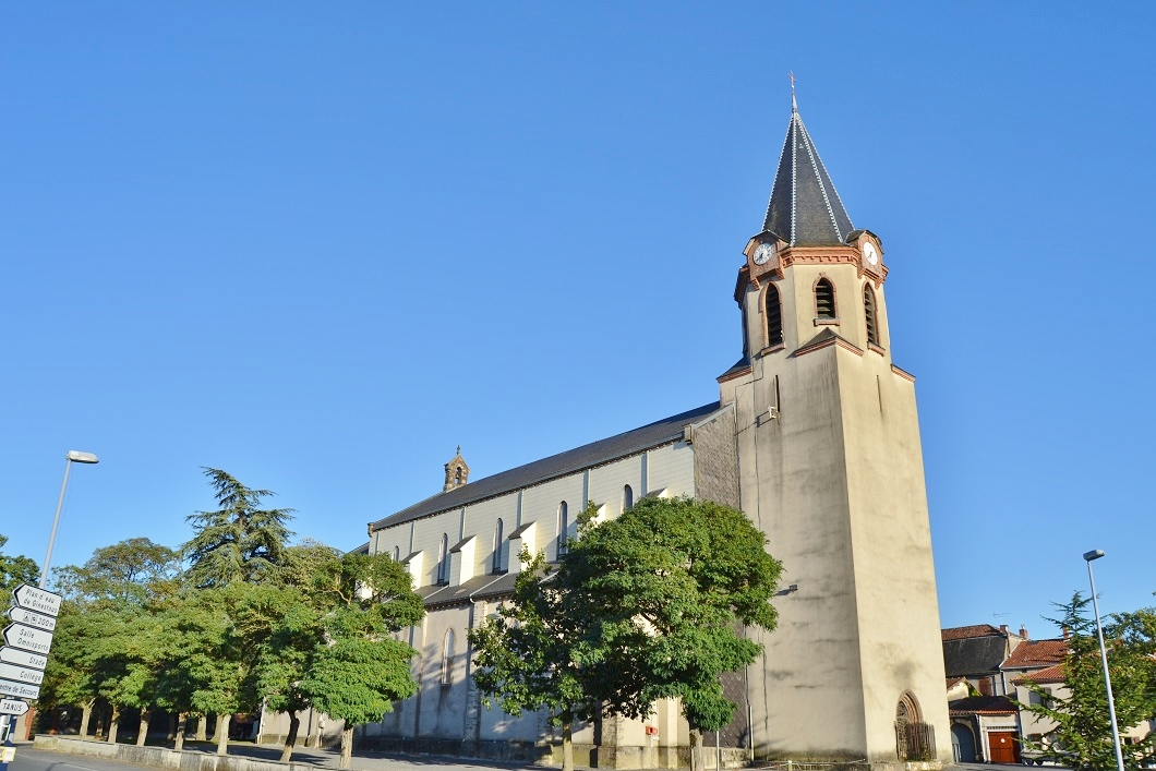 un petit village du sud de la France est situe dans le departement du tarn